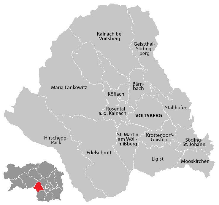 Gemeinden im Bezirk Voitsberg (Steiermark), Stand: 1. Januar 2015